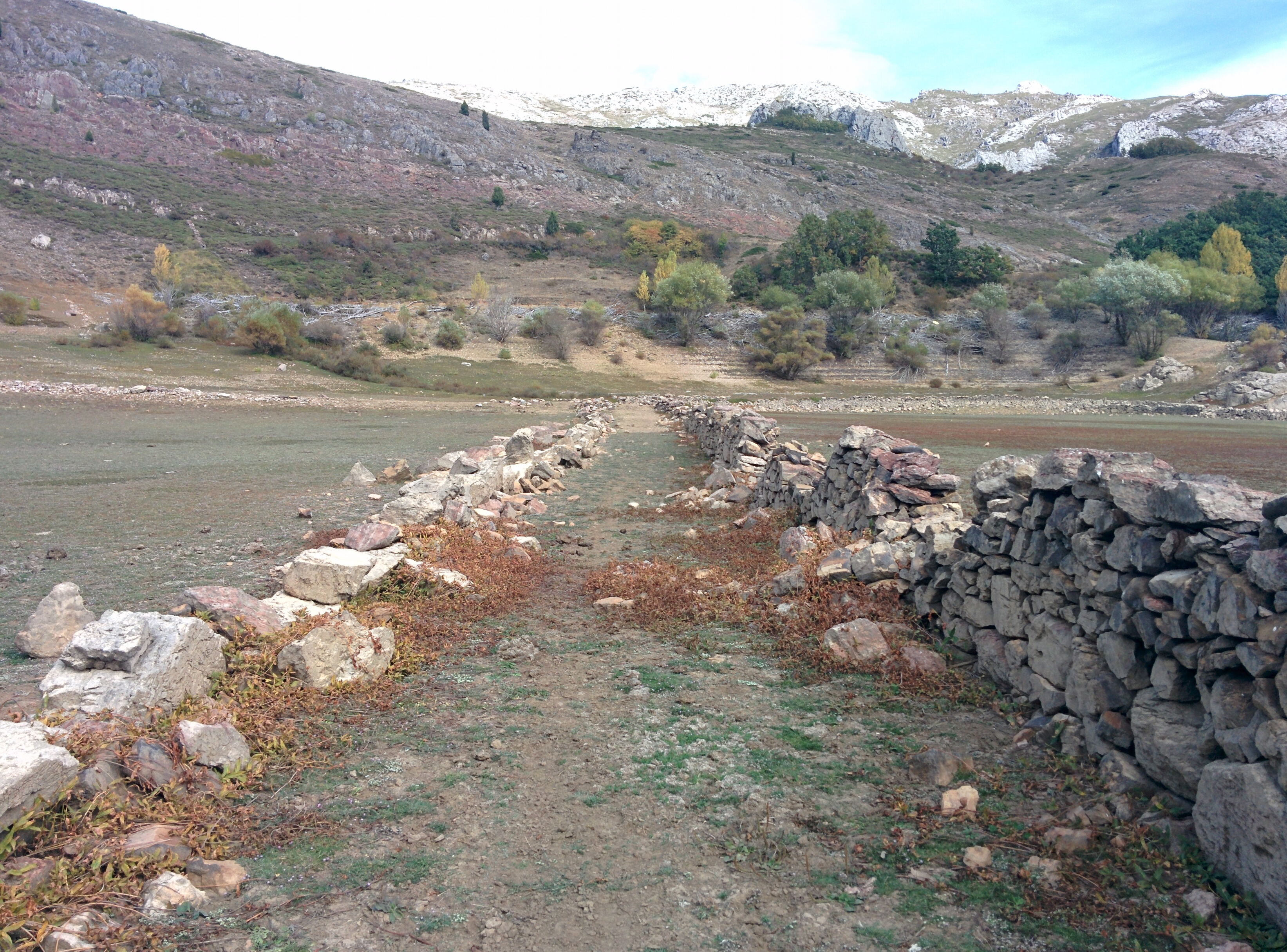 Láncara de Luna (León, España) a la vista durante la sequía de 2017.